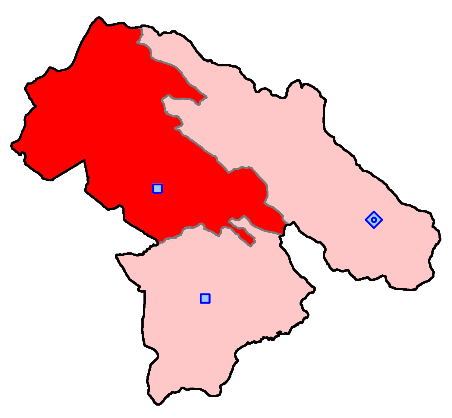 حوزهٔ انتخاباتی کهگیلویه و بهمئی برای انتخابات مجلس شورای اسلامی